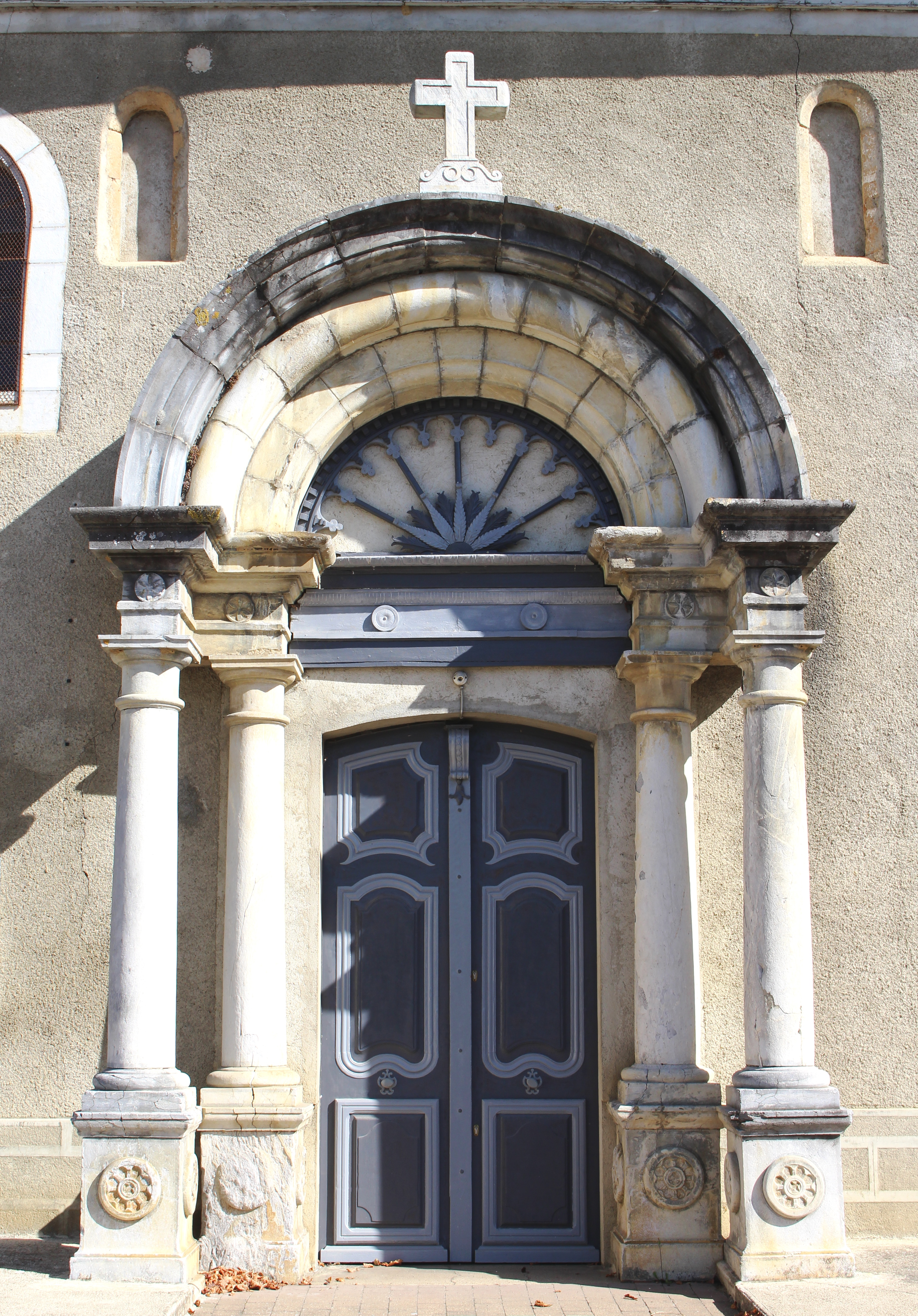 Église Saint-André de Cabanac (Hautes-Pyrénées)